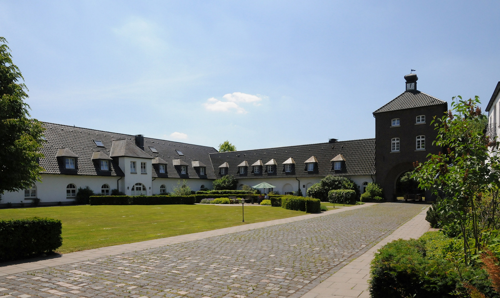 Haus Winnenthal in Xanten-Birten, Wirtschaftshof aus dem 19. Jahrhundert